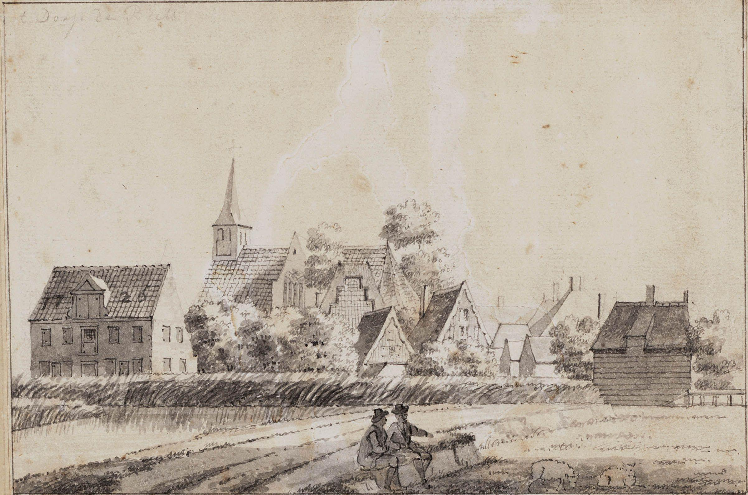 Zicht op Beets met kerk op een prent van Jacobus Stellingwerff